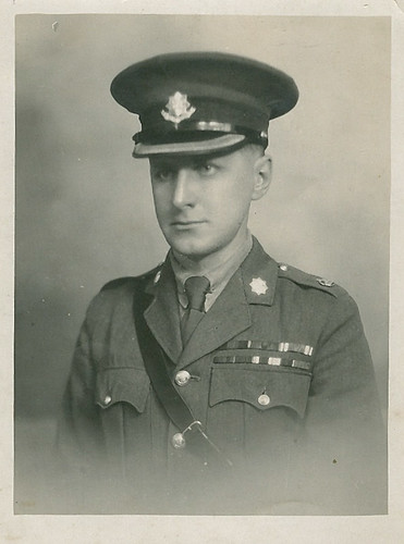 Полковник Г. Г. Тиме на службе в Русском полке